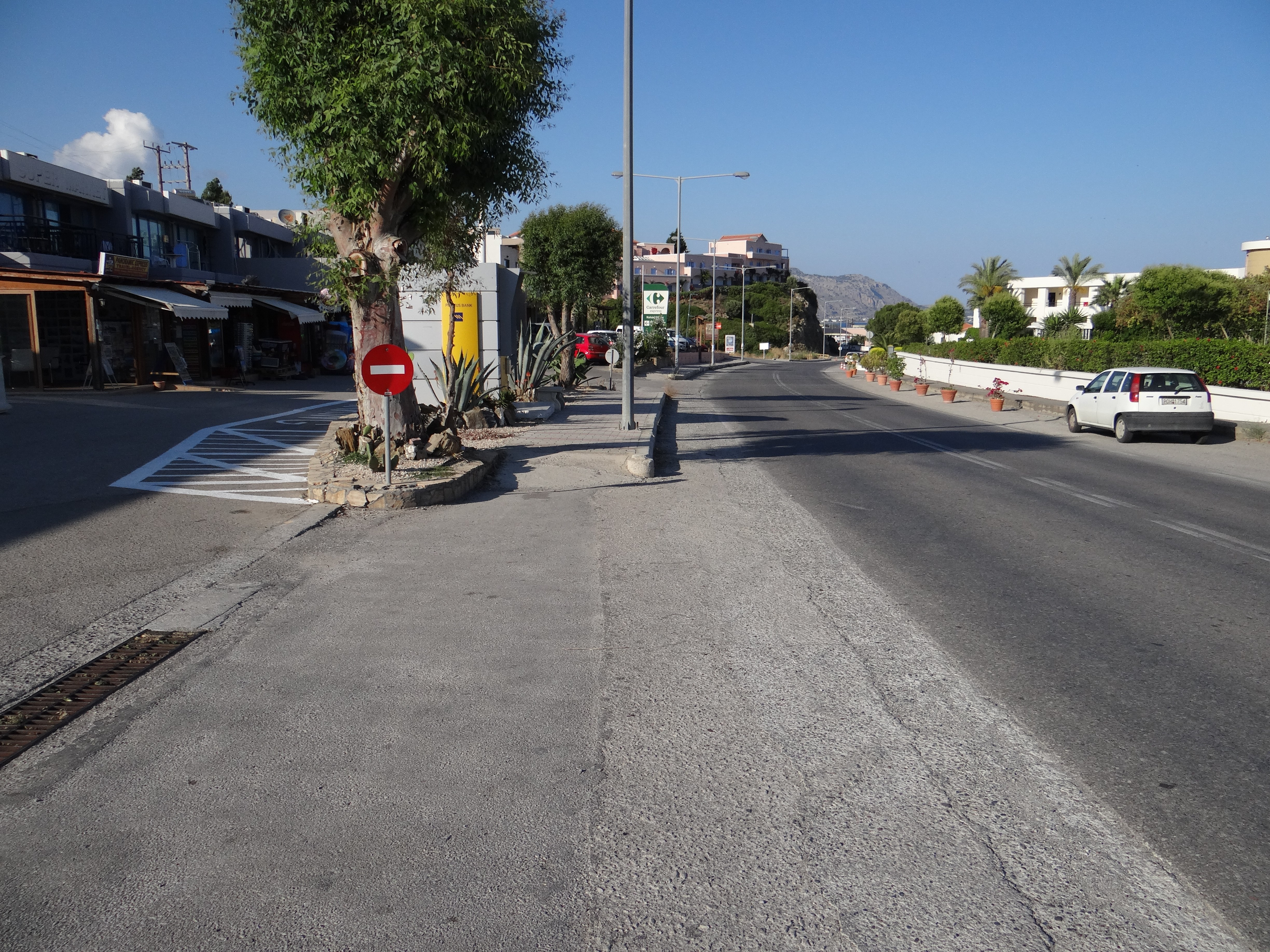 Route vers Rhodes (city), Kiotari, Rhodes, Grèce.